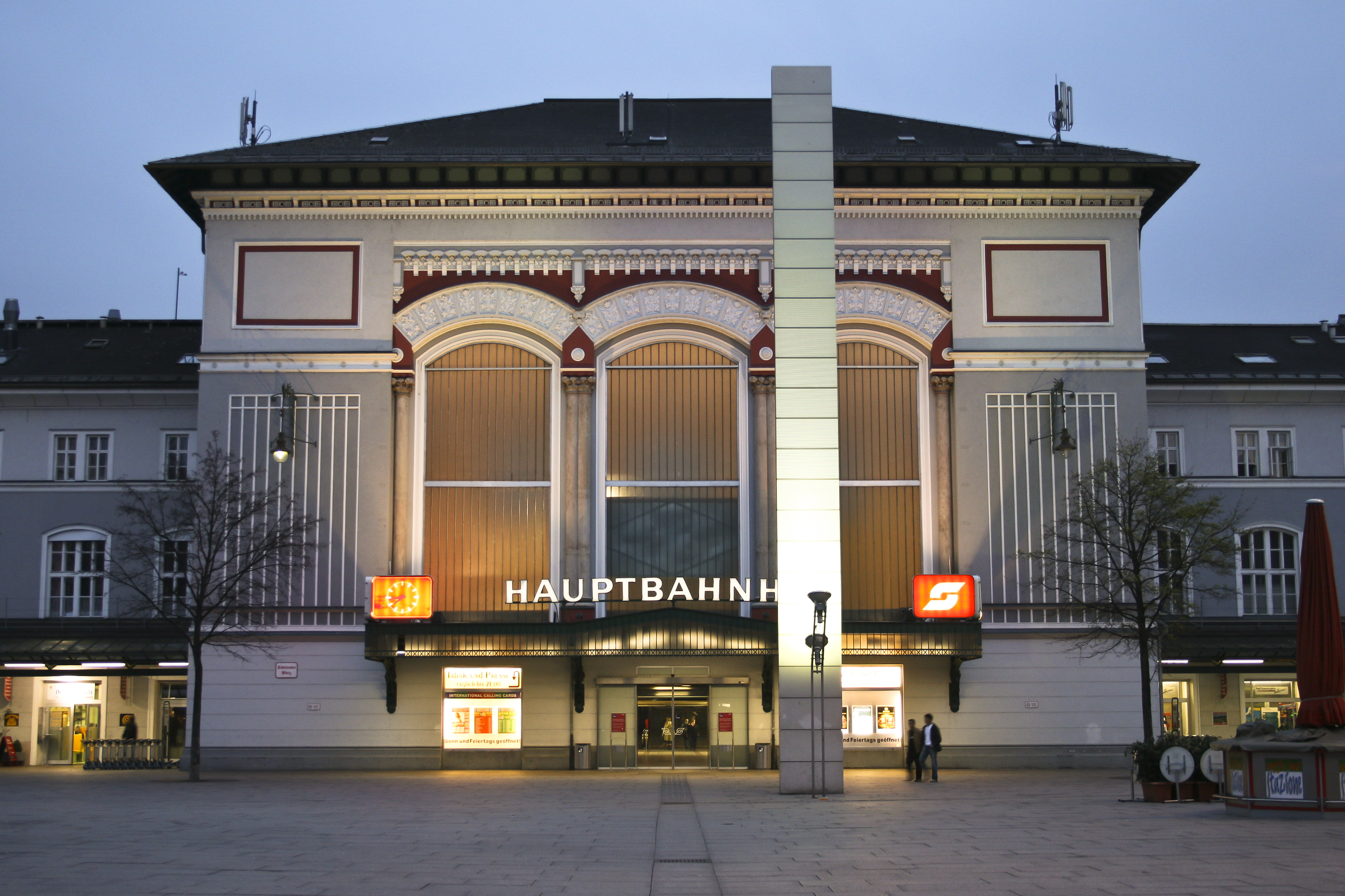 Hauptbahnhof Salzburg, Aufnahmegebäude